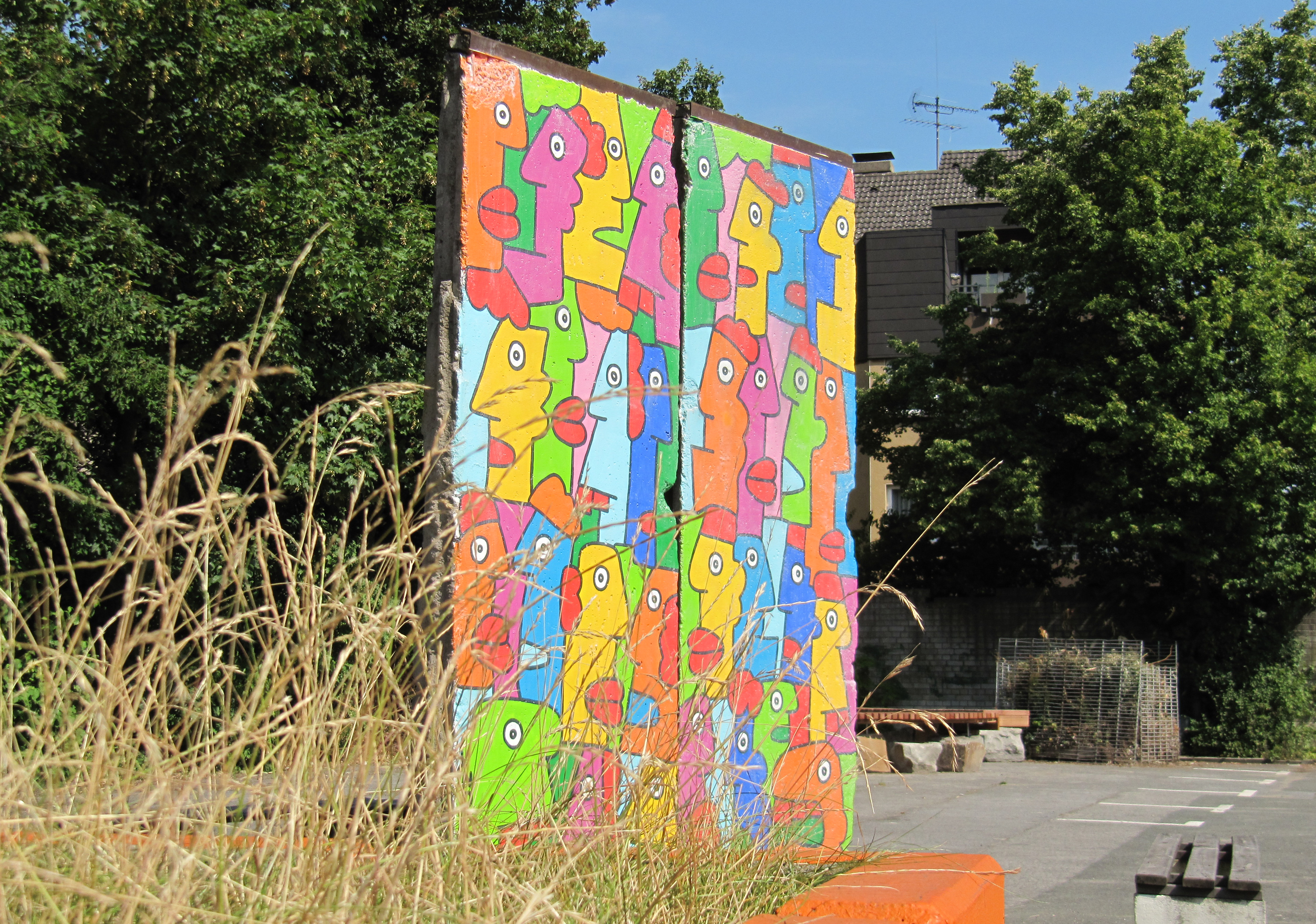 Diese zwei Teile der Berliner Mauer befinden sich seit dem Jahr 2011 auf dem Schulhof des Städt. Albert-Martmöller-Gymnasiums in Witten und wurden (auf der Rückseite) von Schülerinnen und Schülern und (auf der Vorderseite) von dem Künstler Thierry Noir bemalt.